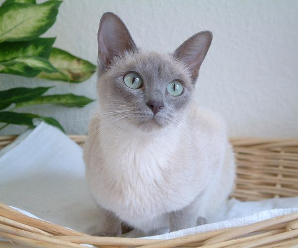 Chat tonkinois lilac mink (chatterie de l'Esprit d'Edenvane).